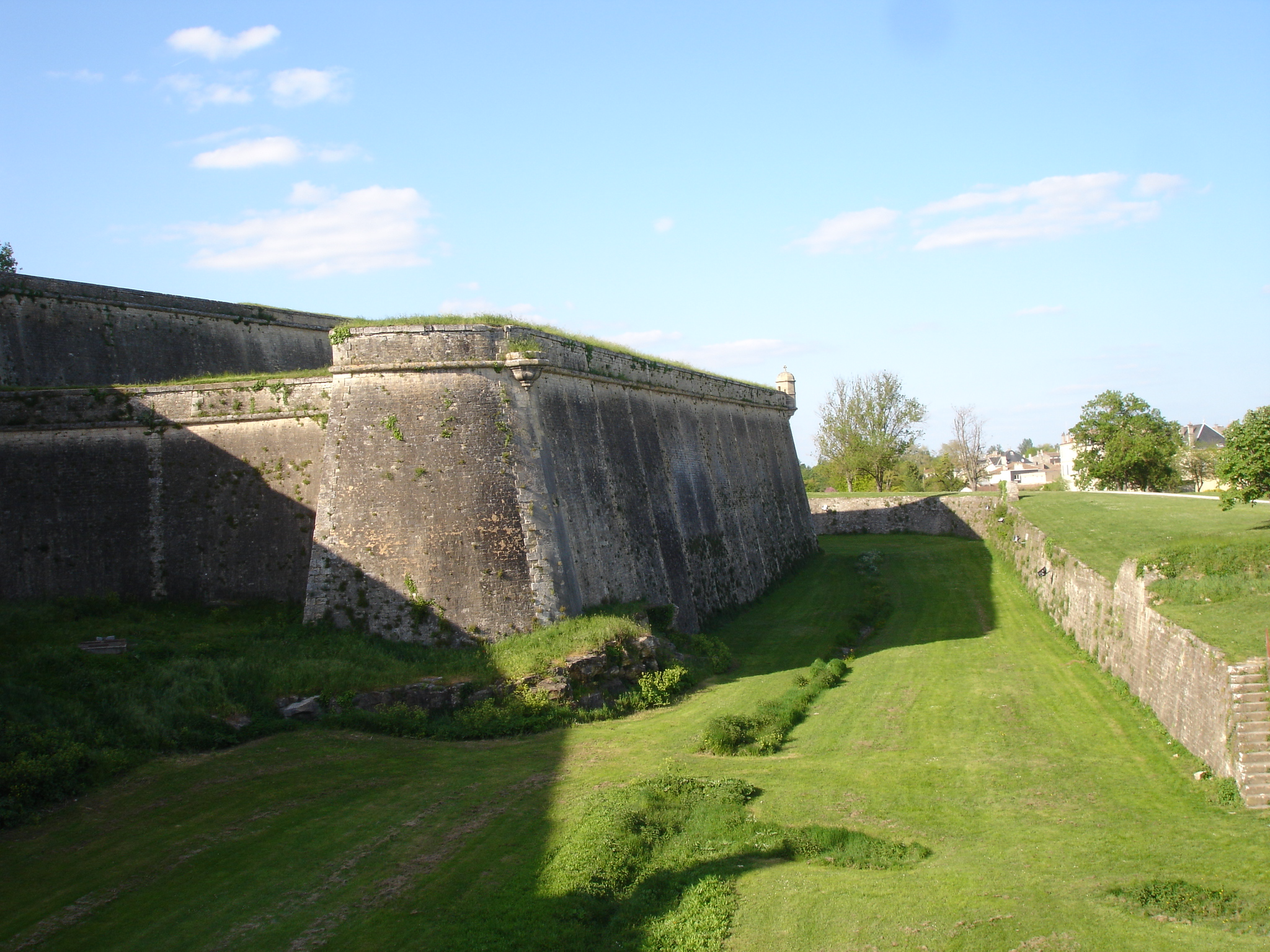 Citadelle de Blaye, Gironde (33), France